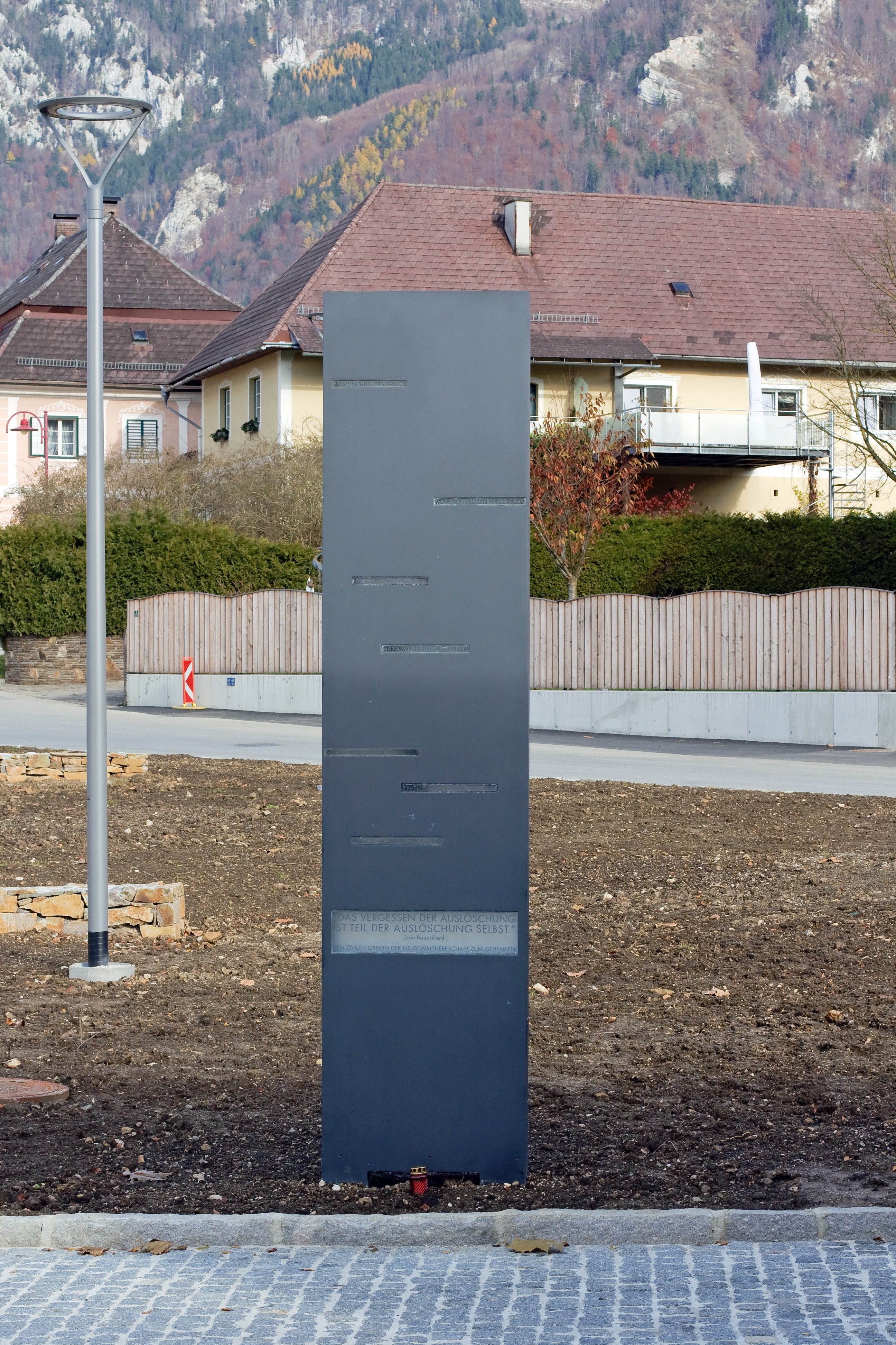 Das „Mahnmal für die zivilen Opfer des Nationalsozialismus“ in Molln (Oberösterreich). Künstler ist Herbert Friedl.[1] Es wurde erstmals 2003 im früheren Gemeindepark enthüllt, seit Ende 2012 befindet es sich etwas versetzt beim neu errichteten Bürger- und Musikzentrum.